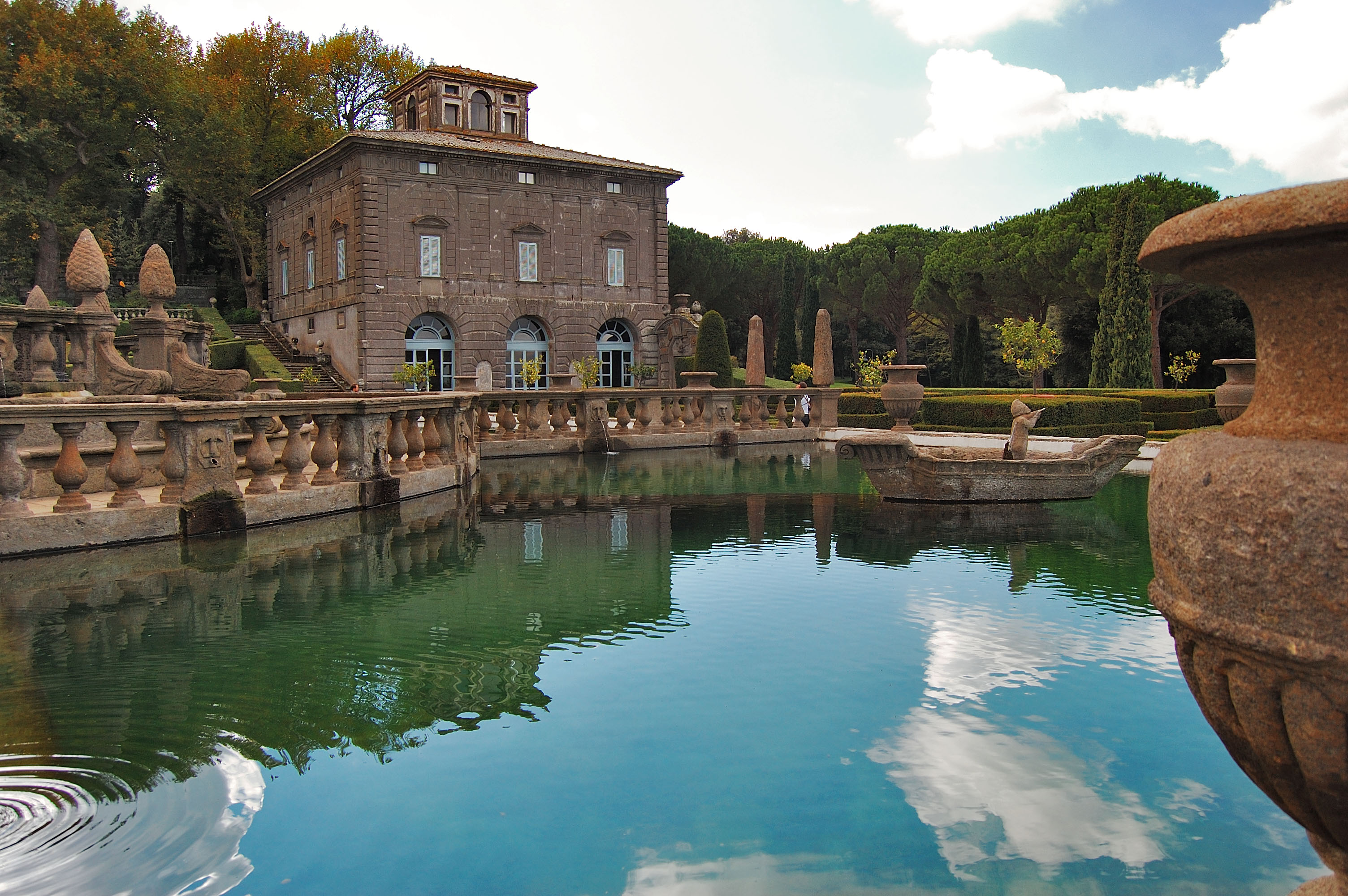 Villa Lante at Bagnaia near Viterbo